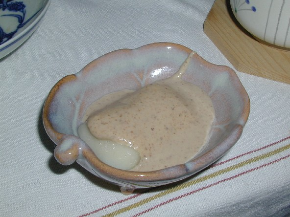 Mochi Foto scattata da me nella casa di campagna di amici giapponesi ad Amelia il 5.1.03